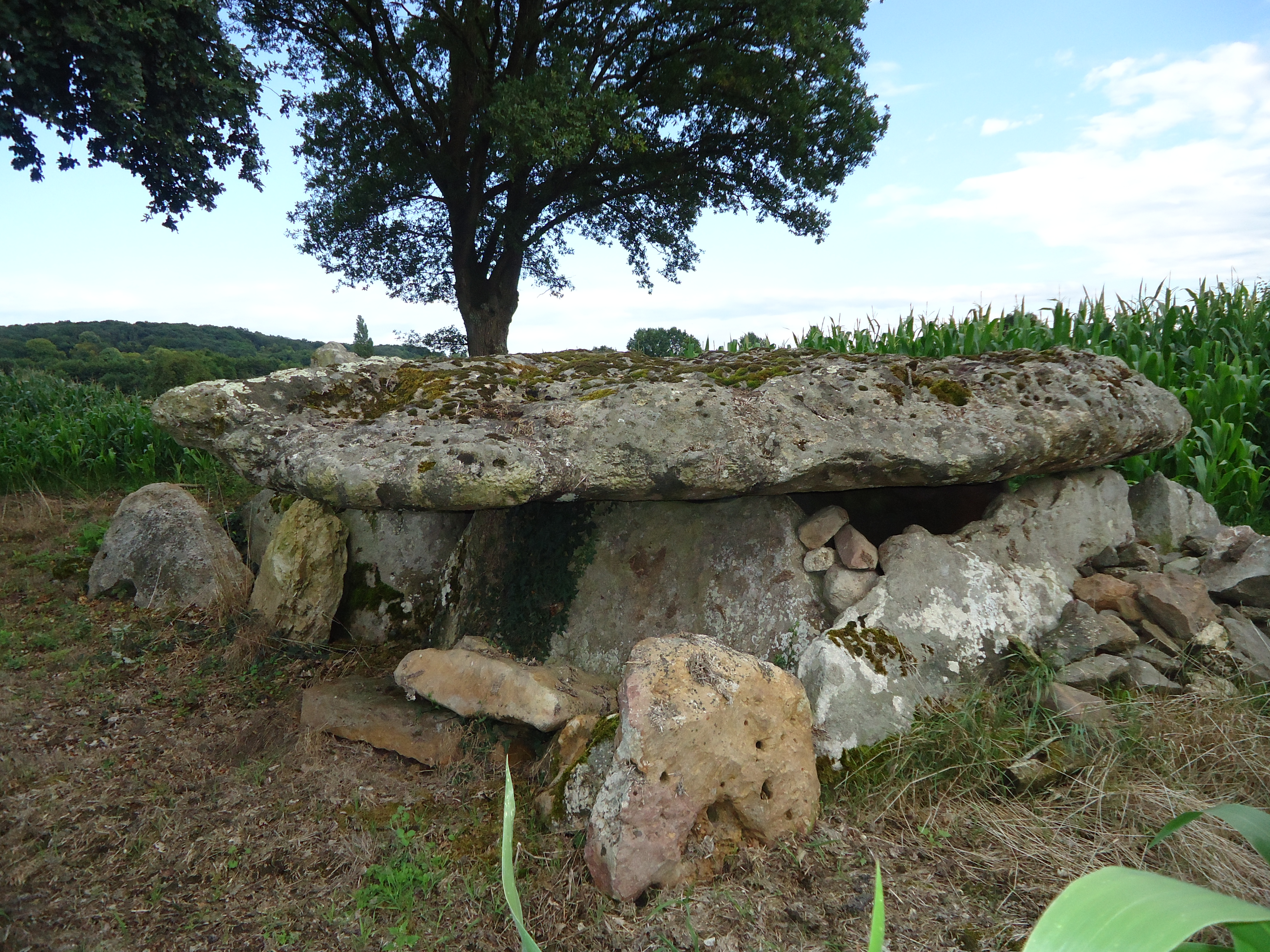 Allée couverte du Colombier - Aubigné-Racan - Sarthe (72)